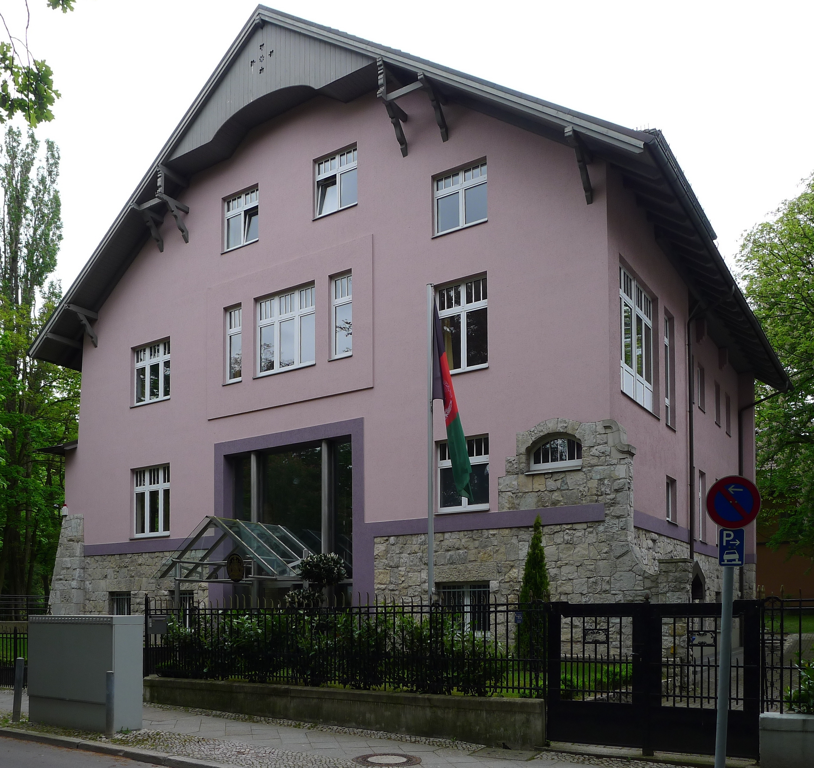 Botschaft